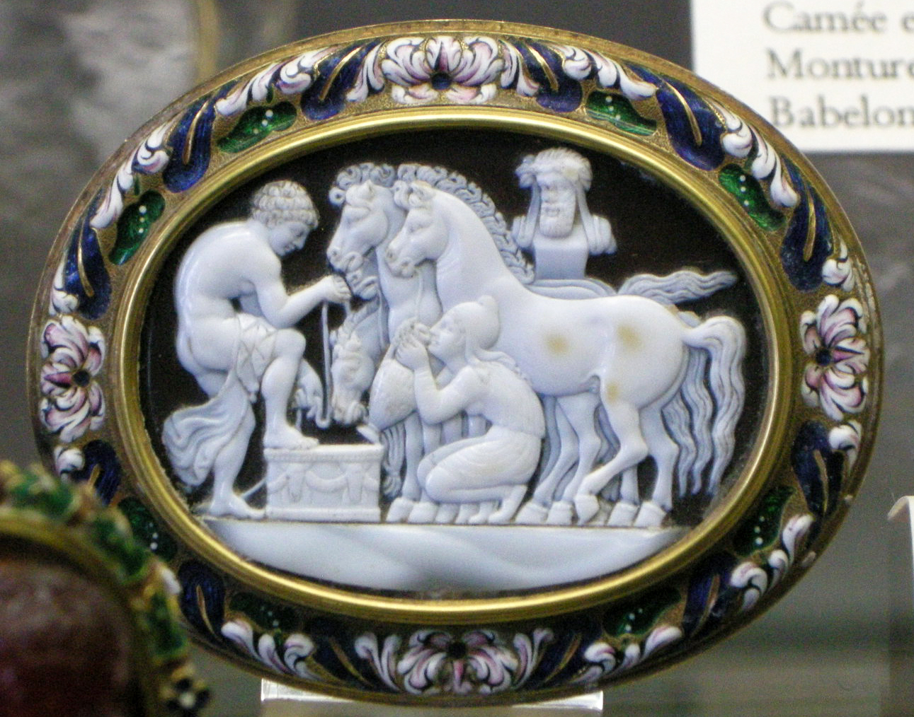 CdM, troilo e polissena sorpresi da achille, sardonice, I sec. a.c.